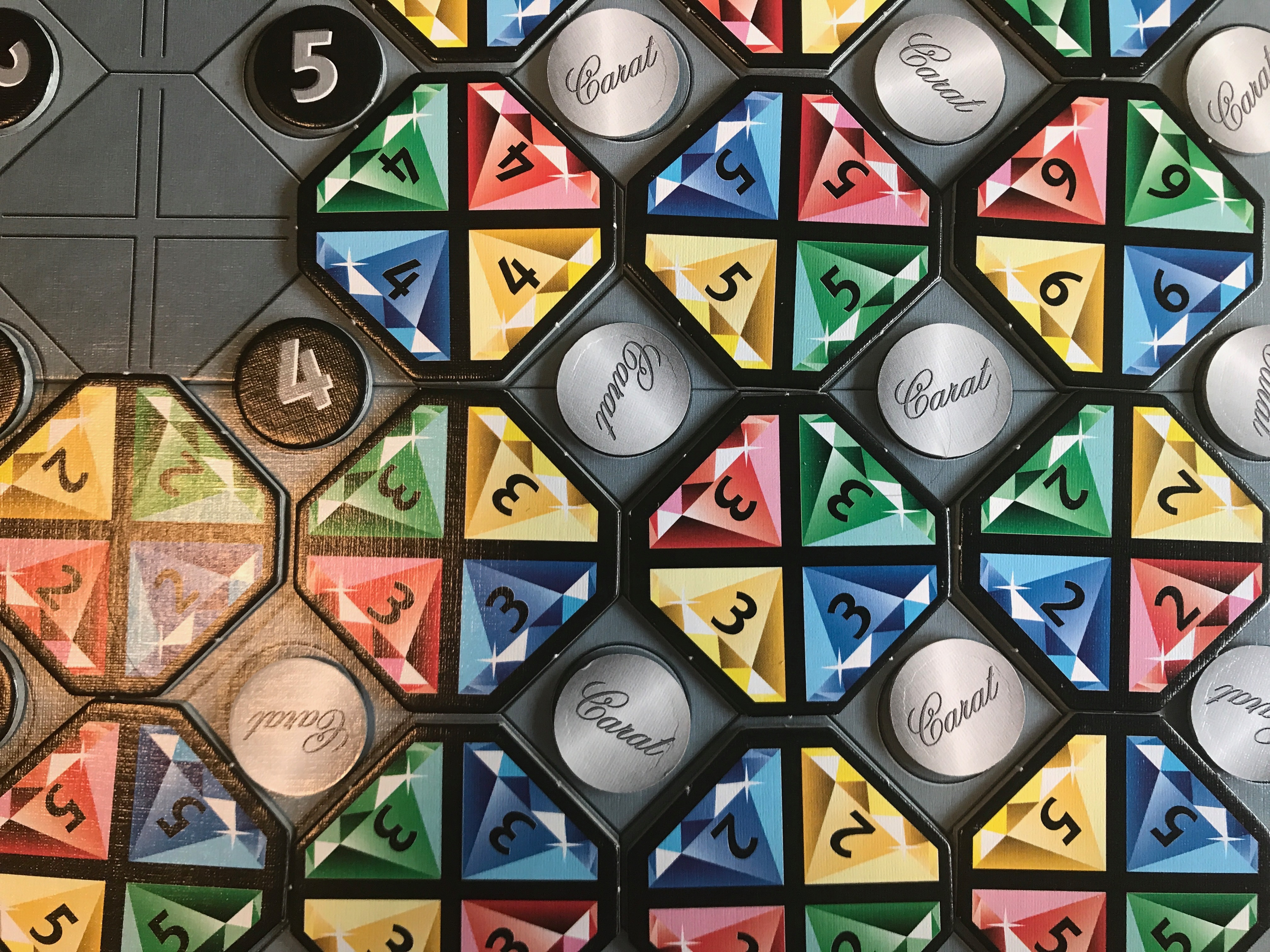 Spielmaterial des Brettspiels Carat